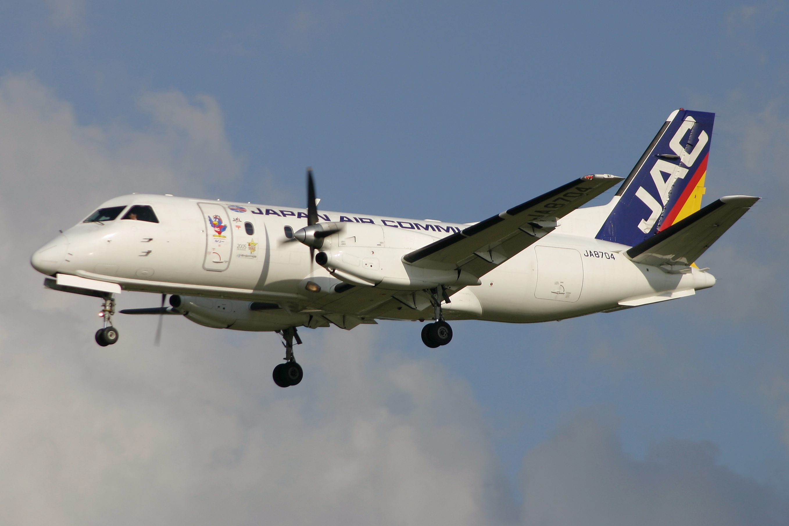 日本エアコミューター サーブ 340B 福岡空港